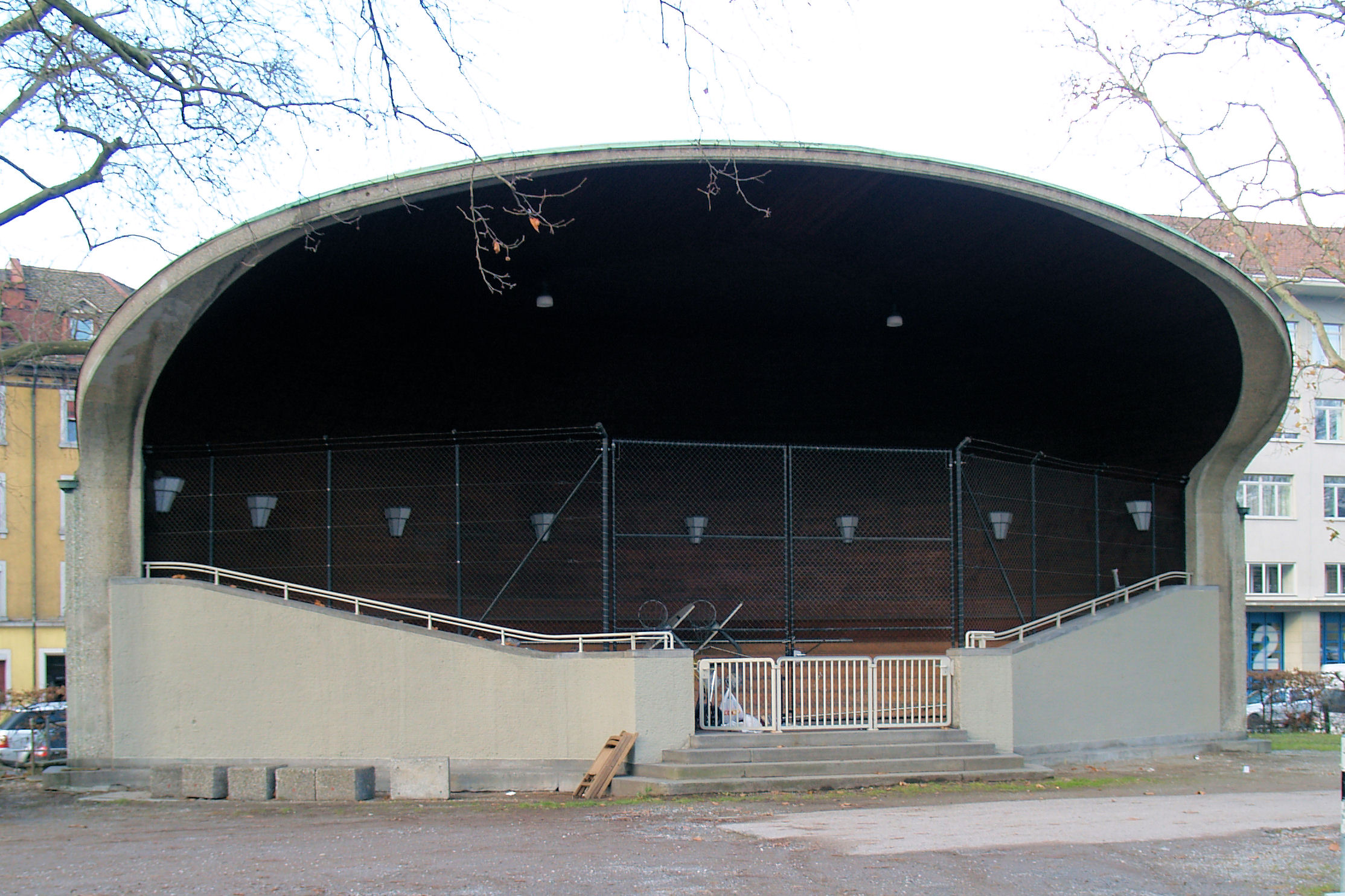 Musikpavillon Sihlhölzli, in der Sportanlage Sihlhölzli Zürich Wiedikon